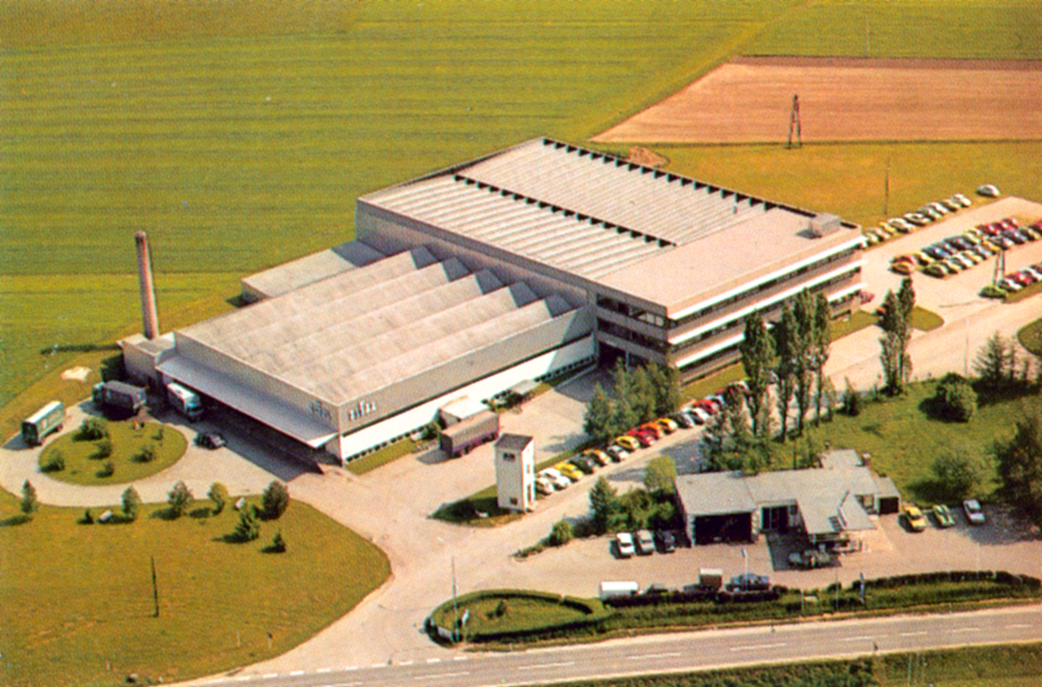 Dräxlmaier Vilsbiburg Geb Luftbild alt